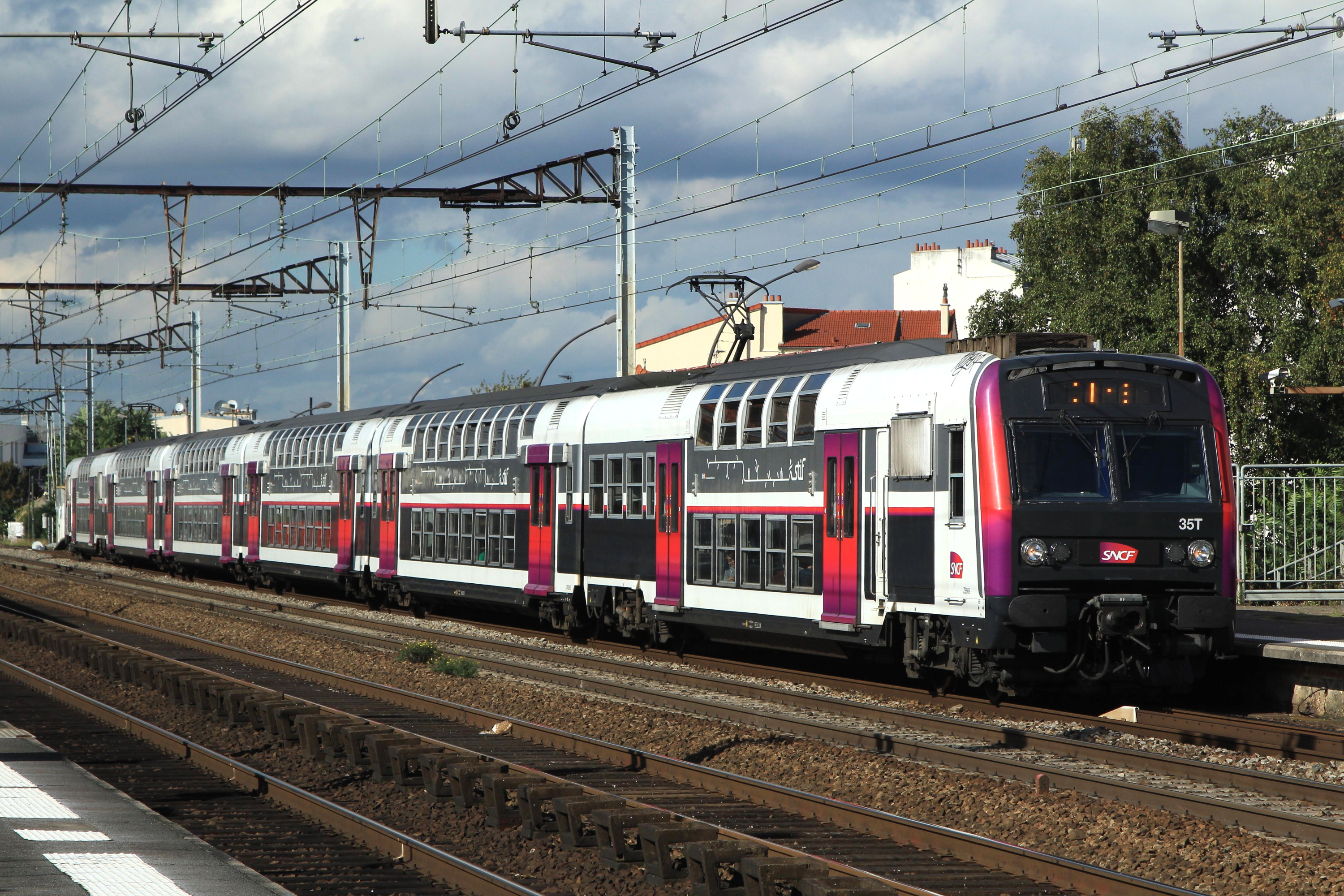 Z2N série 5600 passant sans arrêt en gare de Vitry, assurant une mission CIME.